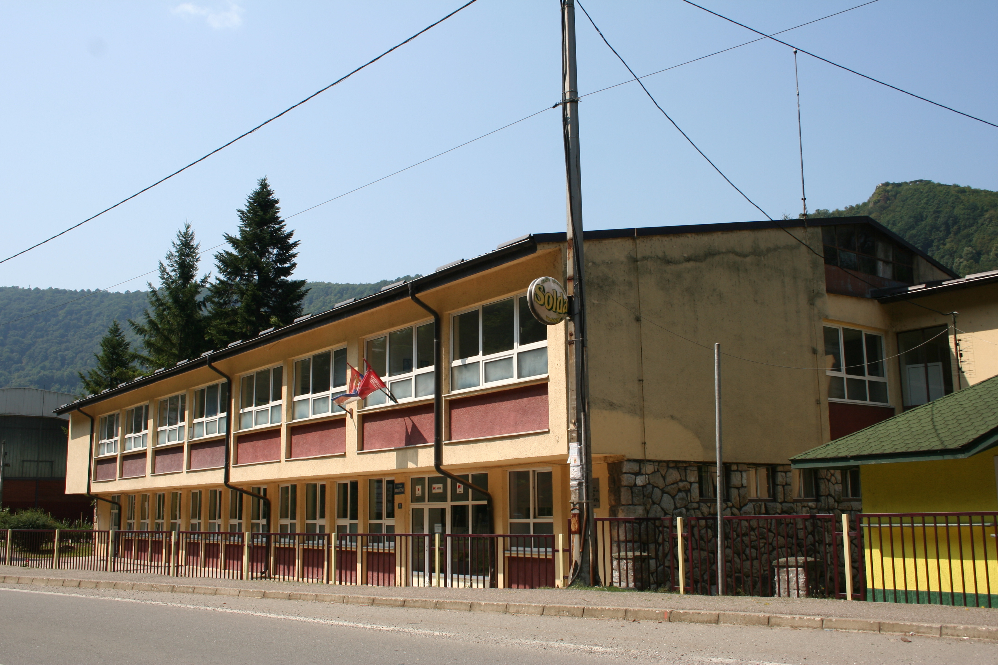 Osnovna škola, Mali Zvornik